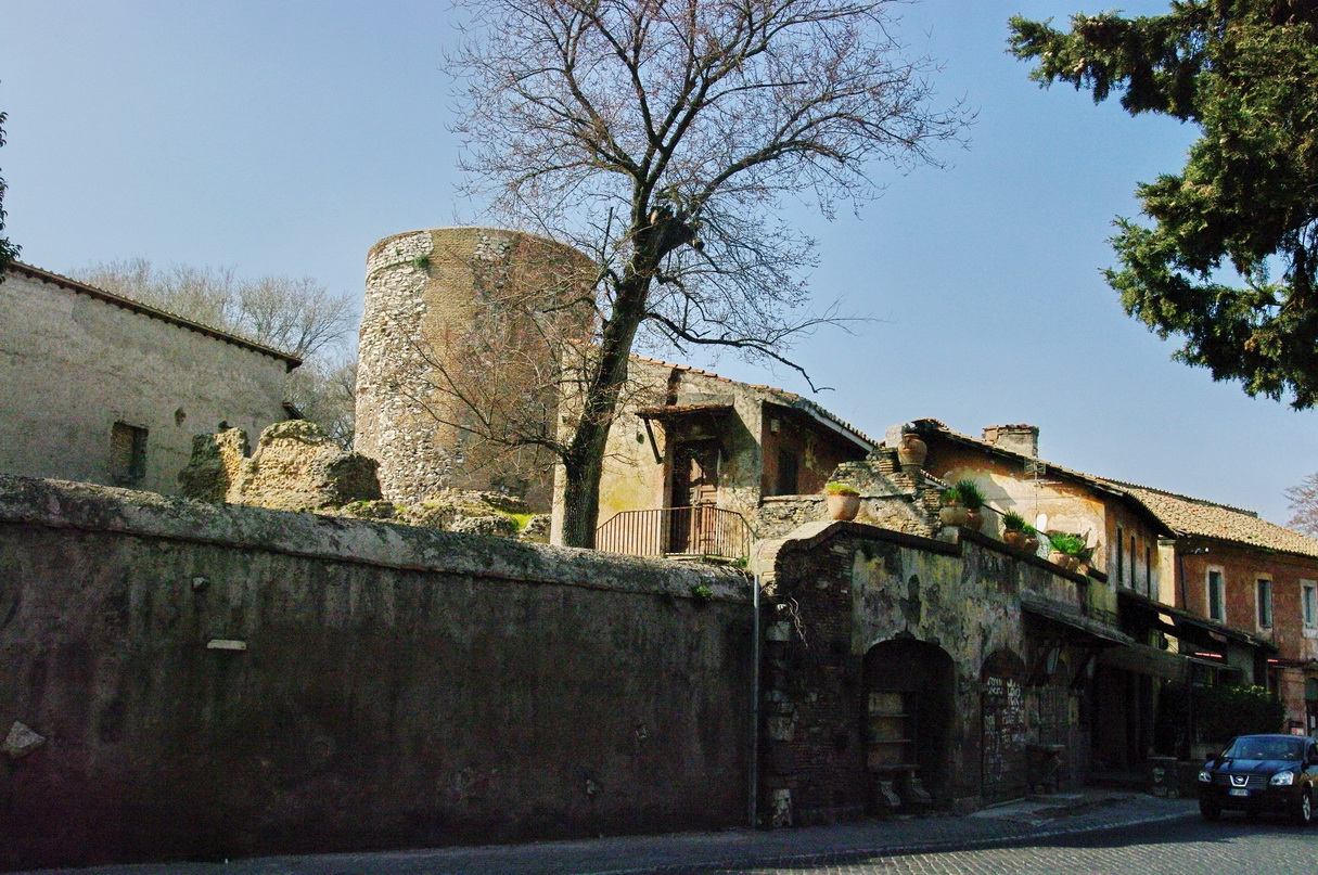 An der Via Appia antica